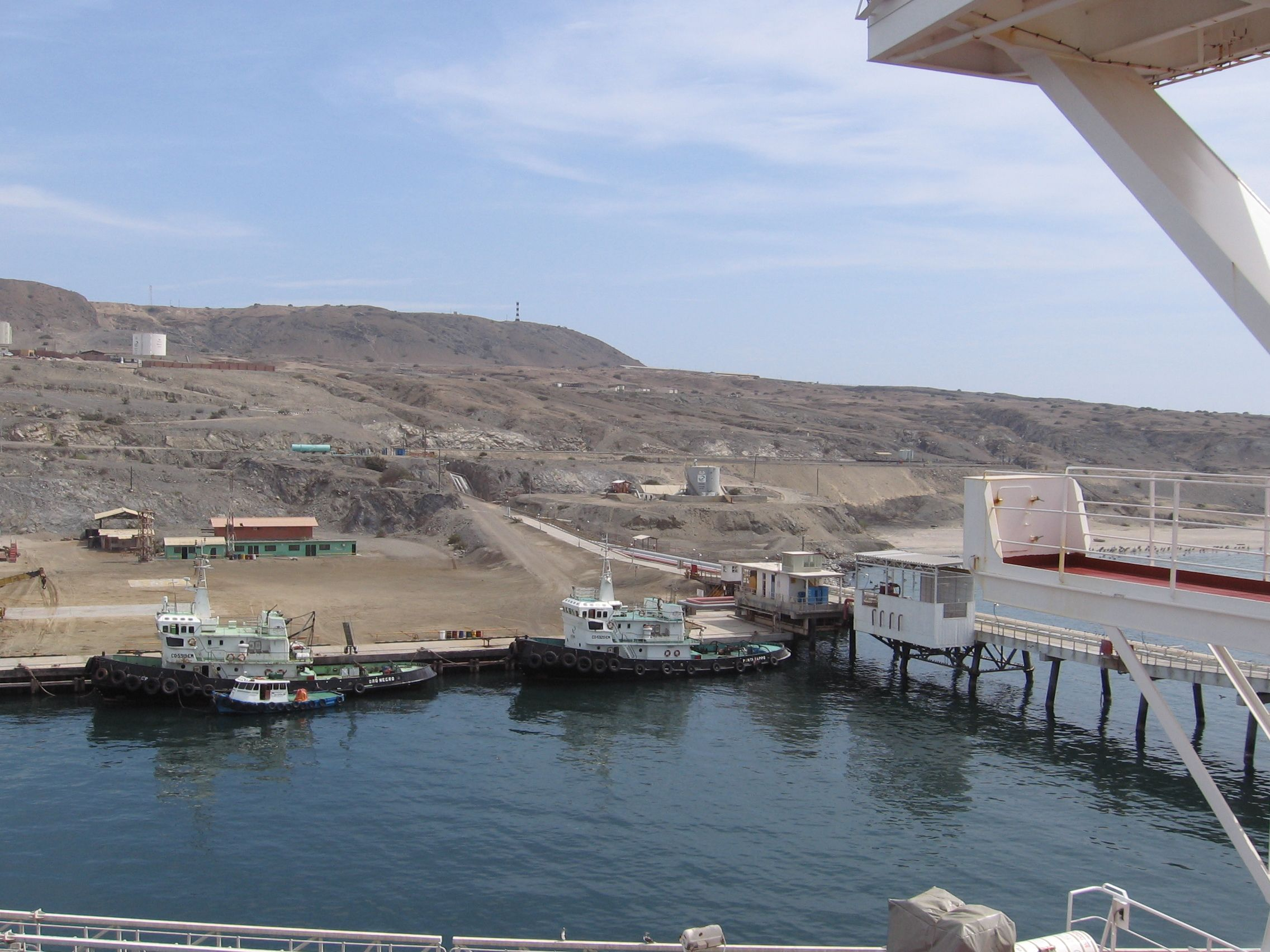 Puerto Bayovar